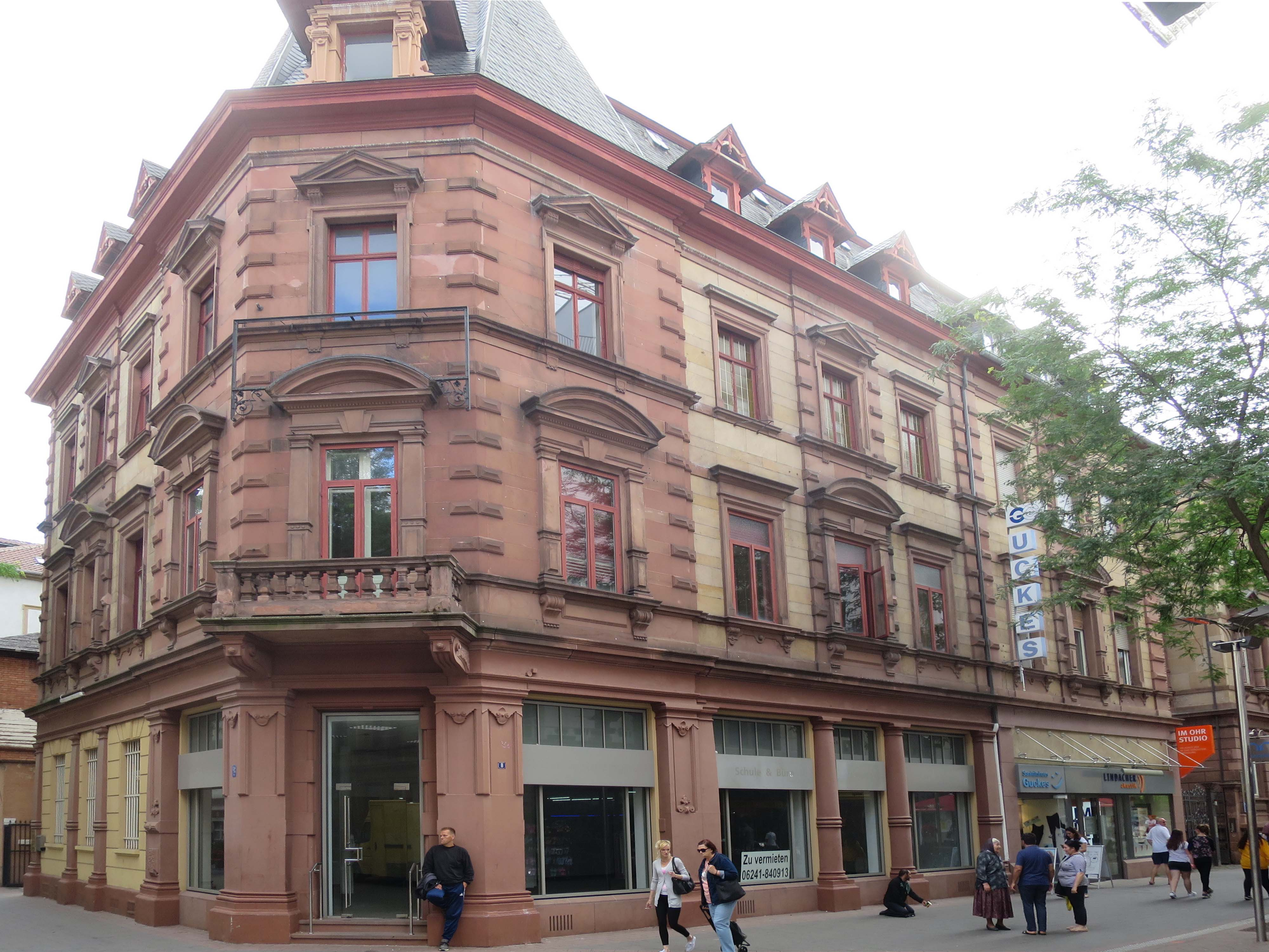 Worms Wilhelm-Leuschner-Straße 4-8 (von rechts nach links)